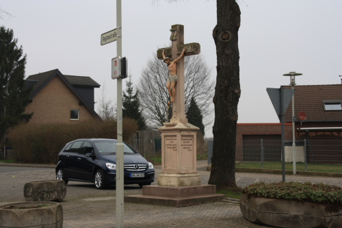 Wegekreuz in der Peterstr. in Düren-Merken